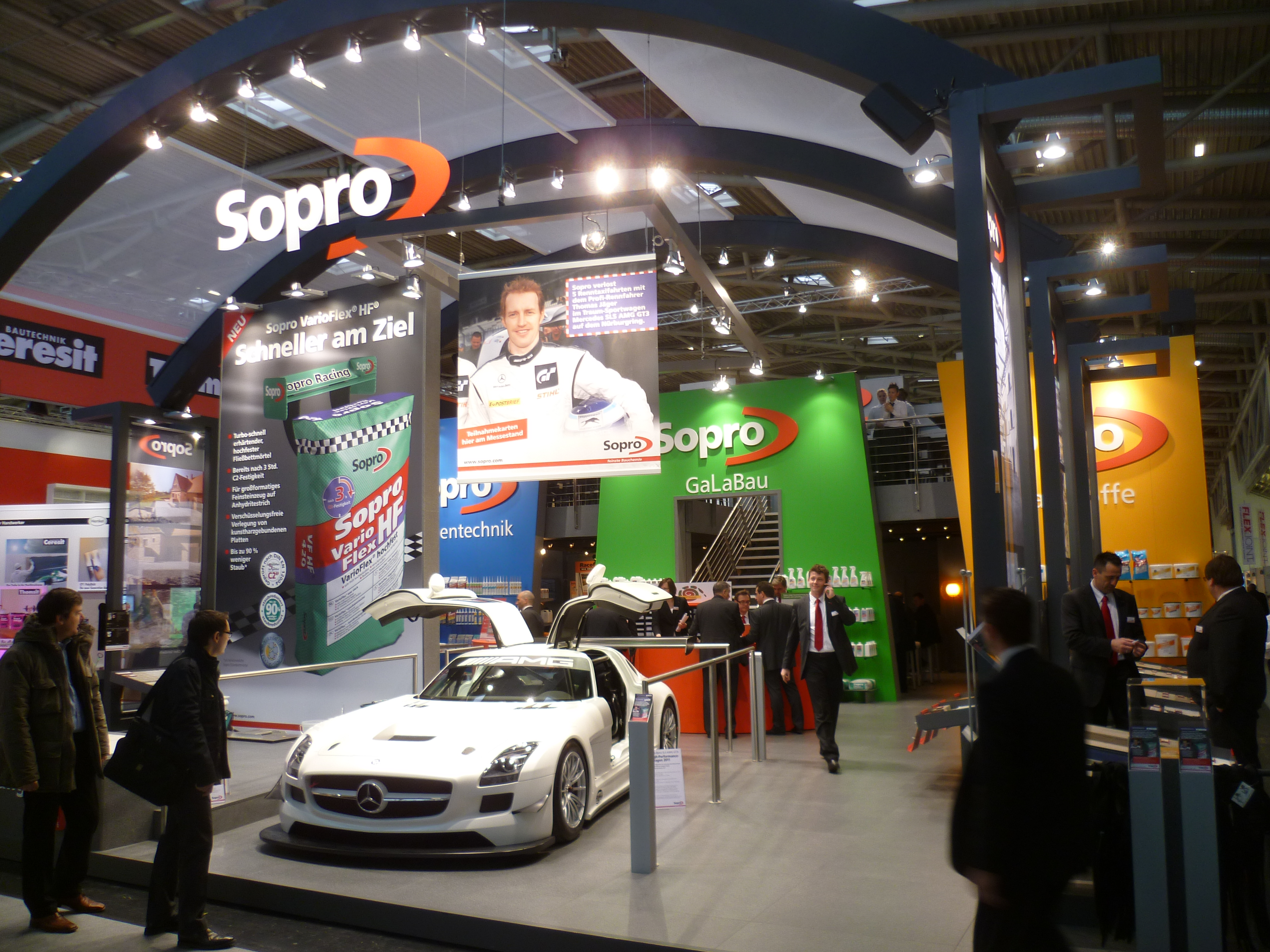 Stand der Sopro Bauchemie auf der Bau 2011